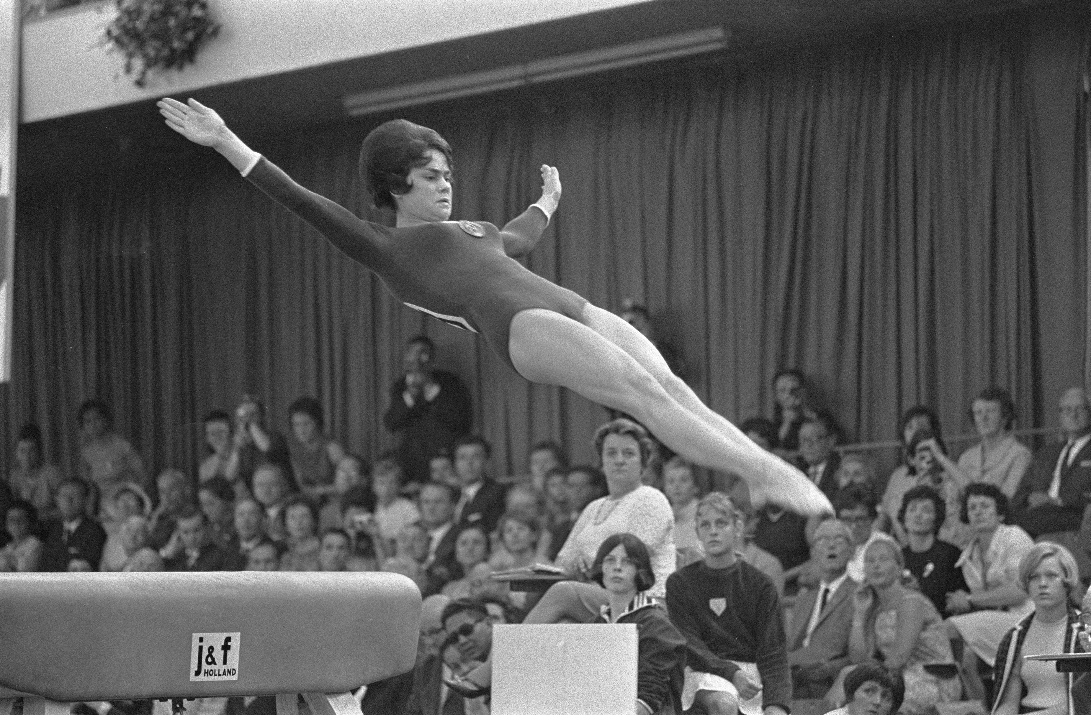 Collectie / Archief : Fotocollectie Anefo Reportage / Serie : [ onbekend ] Beschrijving : Europese turnkampioenschappen, de Russische Drouginina op evenwichtsbalk Datum : 28 mei 1967 Trefwoorden : kampioenschappen, turnen Fotograaf : Kroon, Ron / Anefo Auteursrechthebbende : Nationaal Archief Materiaalsoort : Negatief (zwart/wit) Nummer archiefinventaris : bekijk toegang 2.24.01.05 Bestanddeelnummer : 920-3562